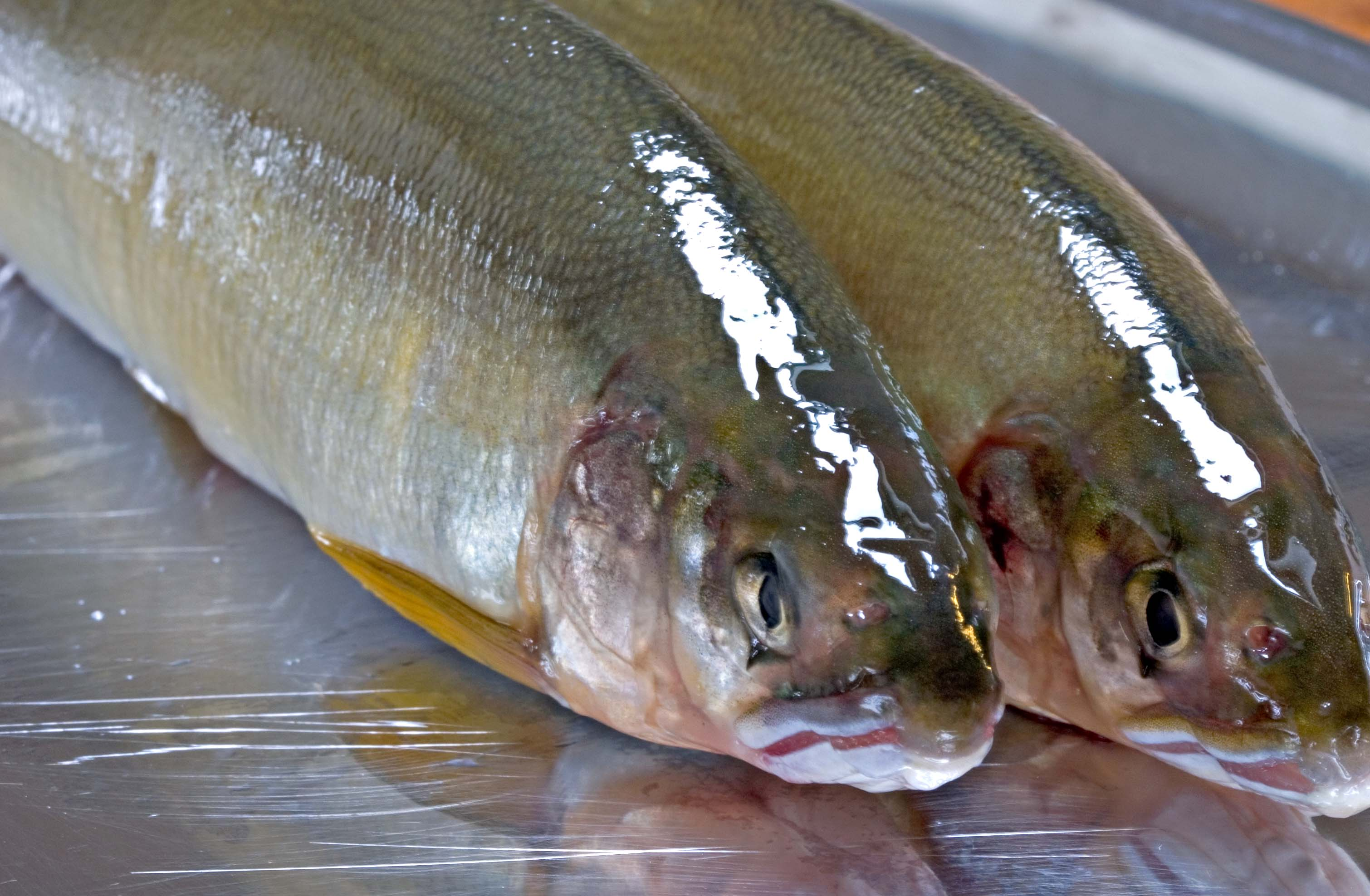 Two Ayu